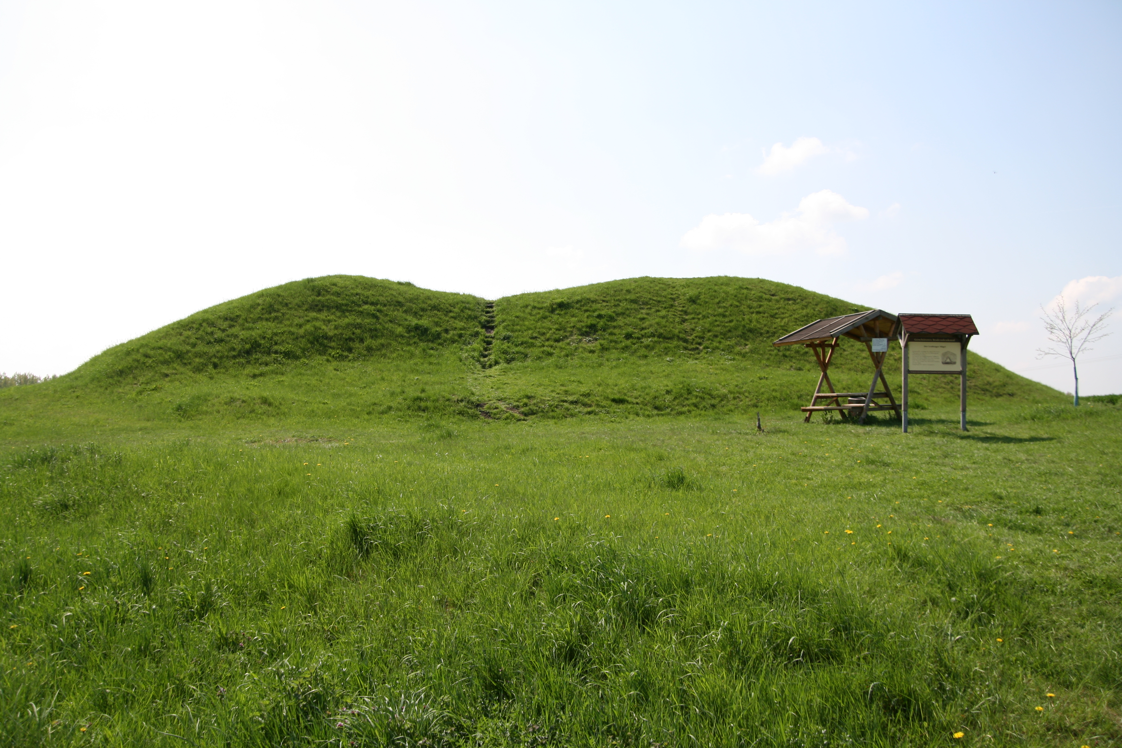 "Grabhügel von Leubingen" in Thuringia, Germany